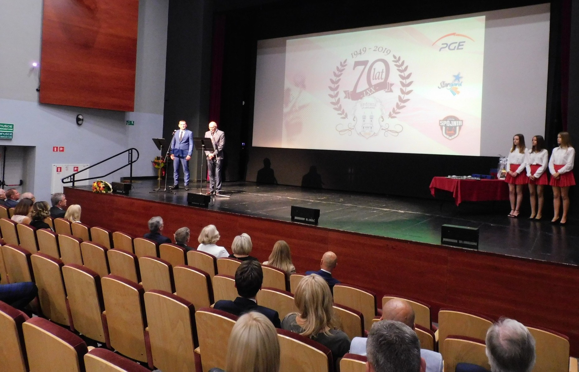 Jubileusz 70-lecia. Gala PGE Spójnia Stargard